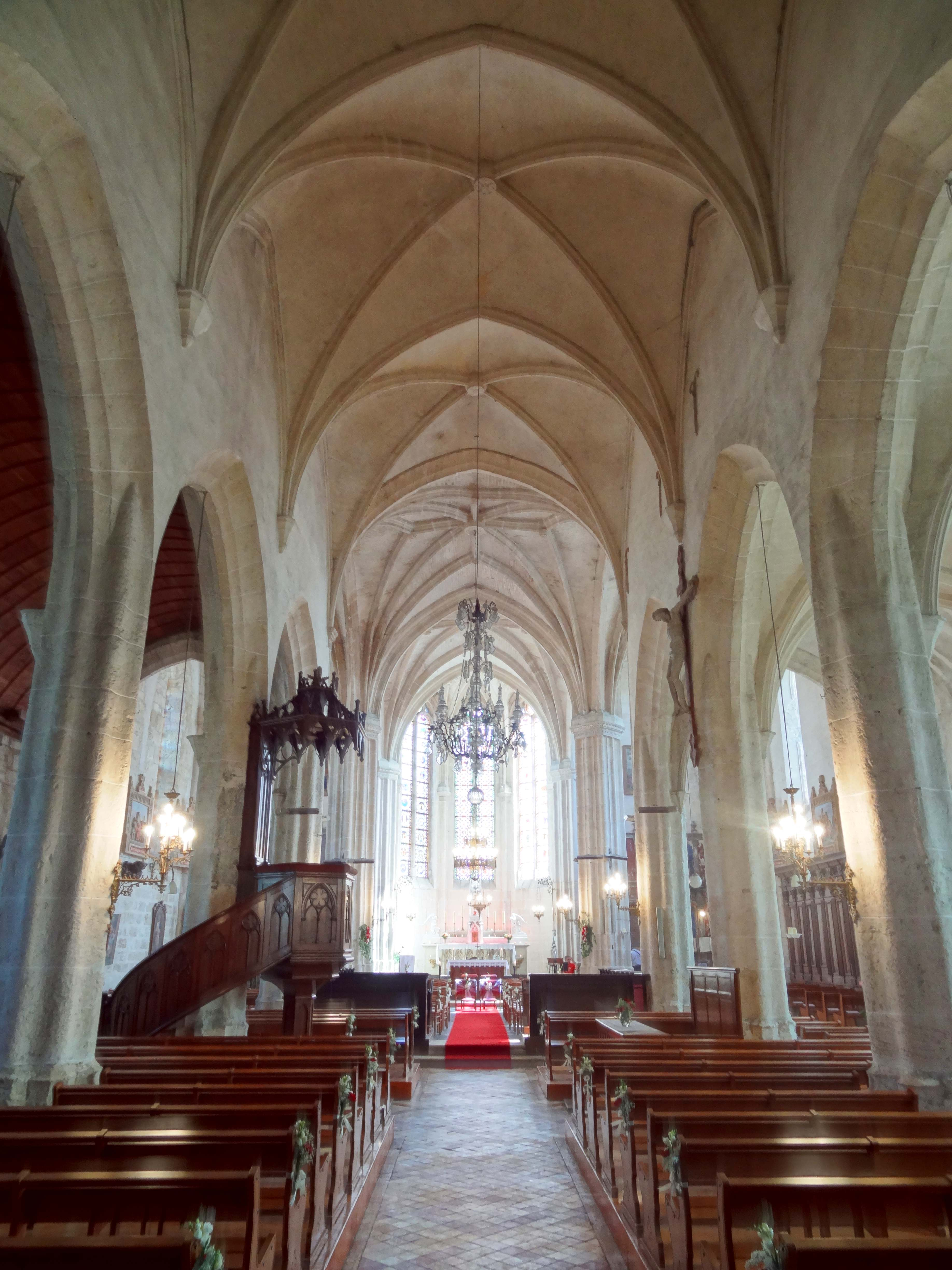 Intérieur de l'église - voir titre.